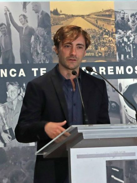 Instituciones y personalidades se han sumado esta mañana a familiares y amigos para rendir un sentido homenaje a Ángel Nieto, campeón mundial de motociclismo e hijo adoptivo de Madrid en un acto organizado por su familia con la colaboración del Ayuntamiento de Madrid y el Consejo Superior Deportes. Desde el Pabellón de los Jardines de Cecilio Rodríguez, del Parque de El Retiro, la alcaldesa de Madrid, Manuela Carmena ha destacado la personalidad “excepcional” del campeón “12+1”, “su pasión y su bondad”. La ciudad de Madrid, “donde pasó su infancia y se fraguó su pasión, necesita muchas personas como él y no le olvidará nunca”, manifestó la alcaldesa, en unas palabras que también repasaron otros aspectos de “quien fue capaz de poner a España en un lugar impensable del motociclismo internacional”.